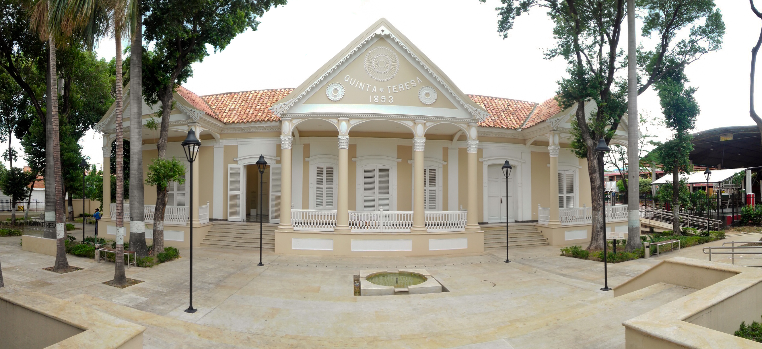 casas